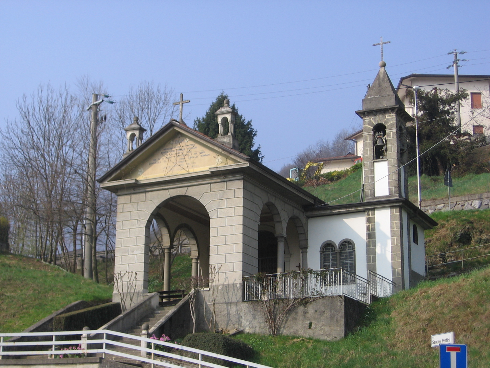 Madonna della schisciada,Gazzaniga (fraz. Masserini), Bergamo, Italia